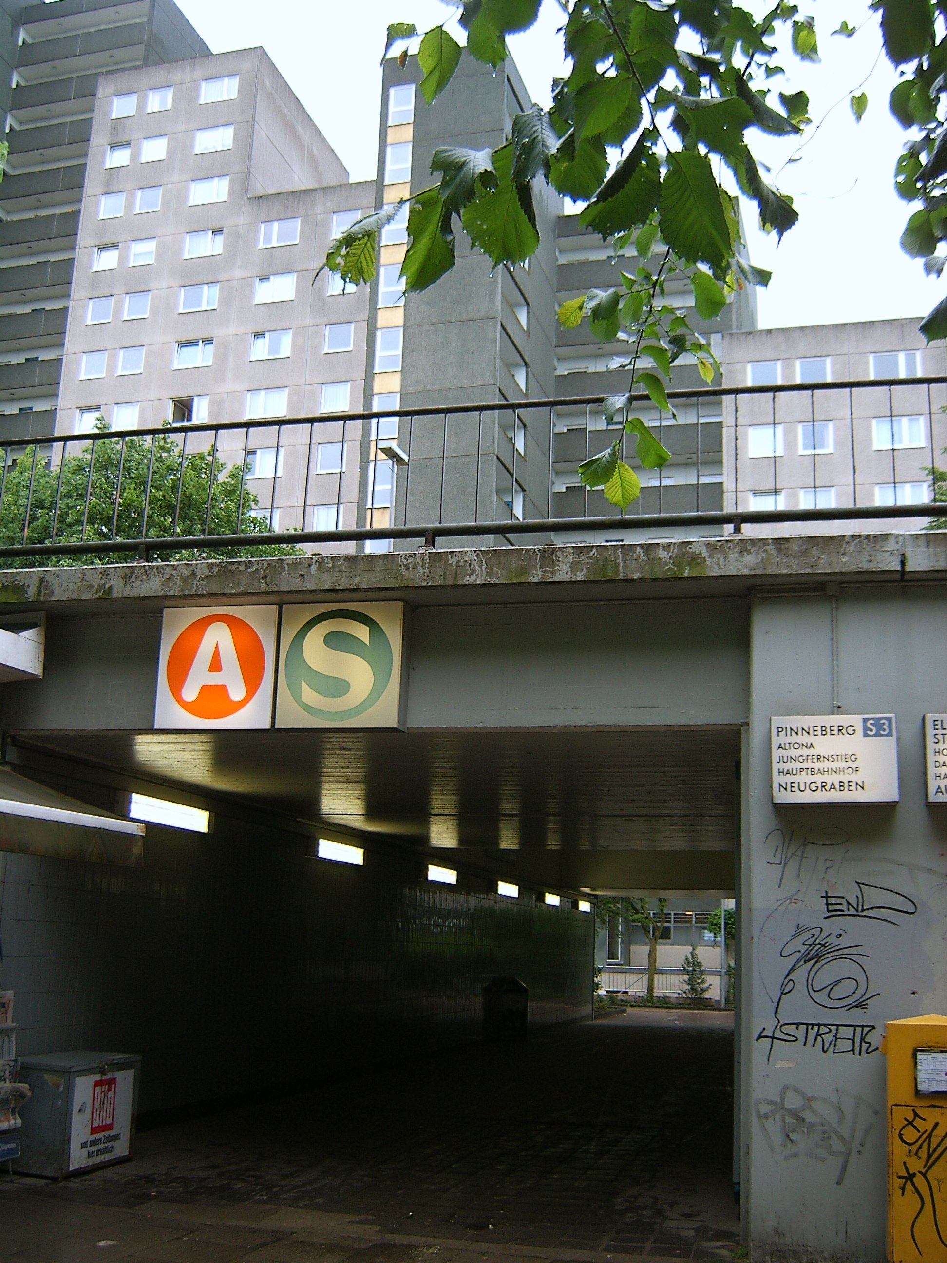 Bildbeschreibung: Hamburg, Stellingen, S-Bahnhof Langenfelde Fotograf: selbst Datum: 31.5.2006